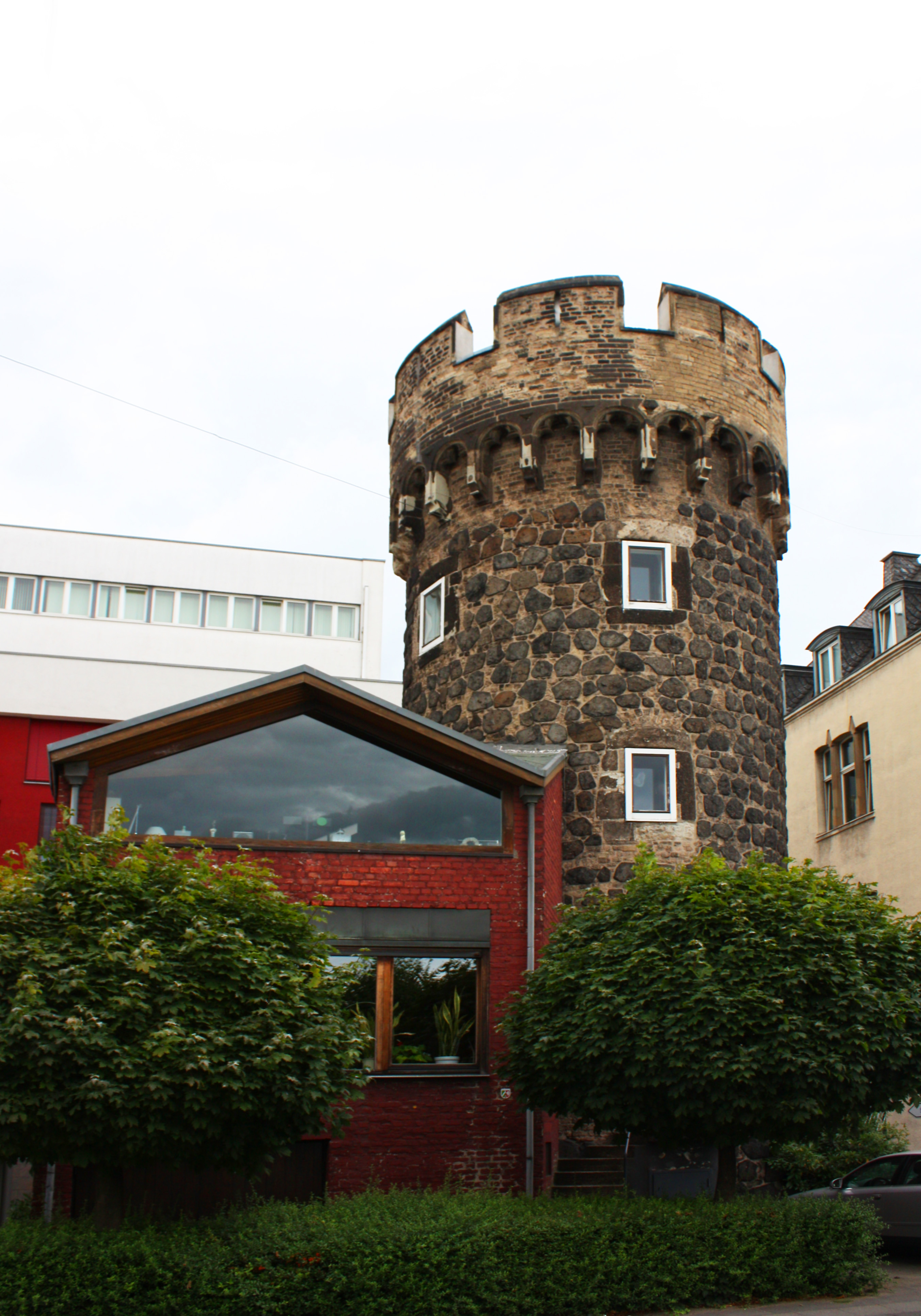 Weckschnapp, Rest der ehemaligen Befestigung Kunibertstorburg in Köln This is the photograph of an architectural monument. It is part of the list of cultural monuments of Köln, no. 81